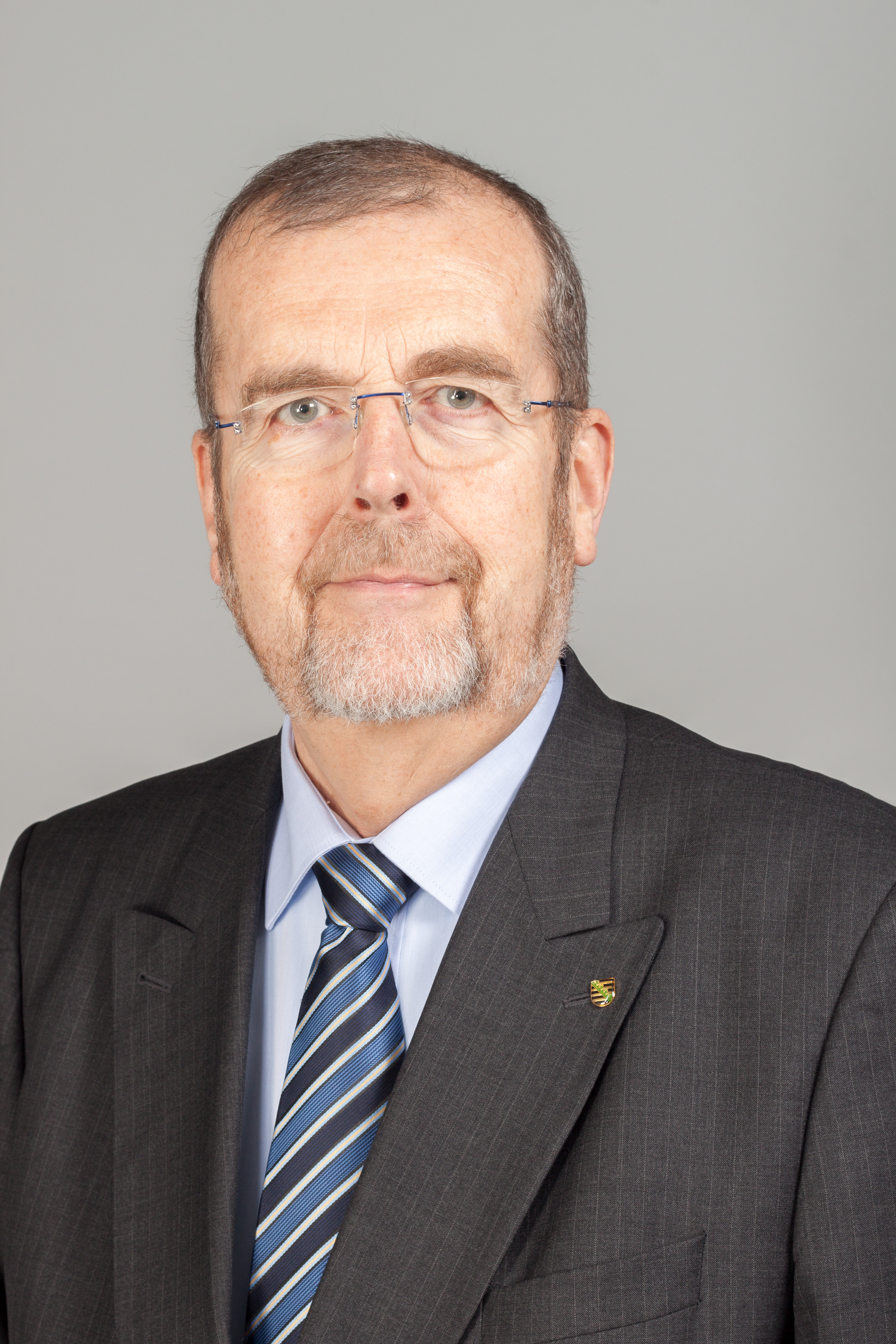 Abgeordneter des Sächsischen Landtages Martin Gillo